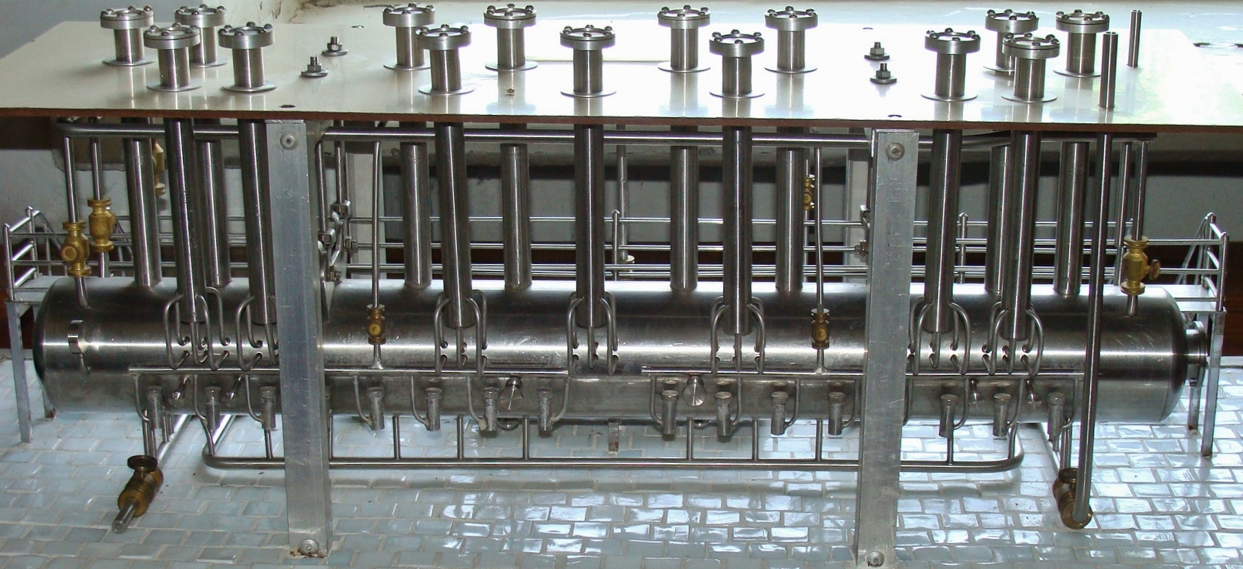 Модель одного из стендов Зуевской ТЭЦ ВТИ